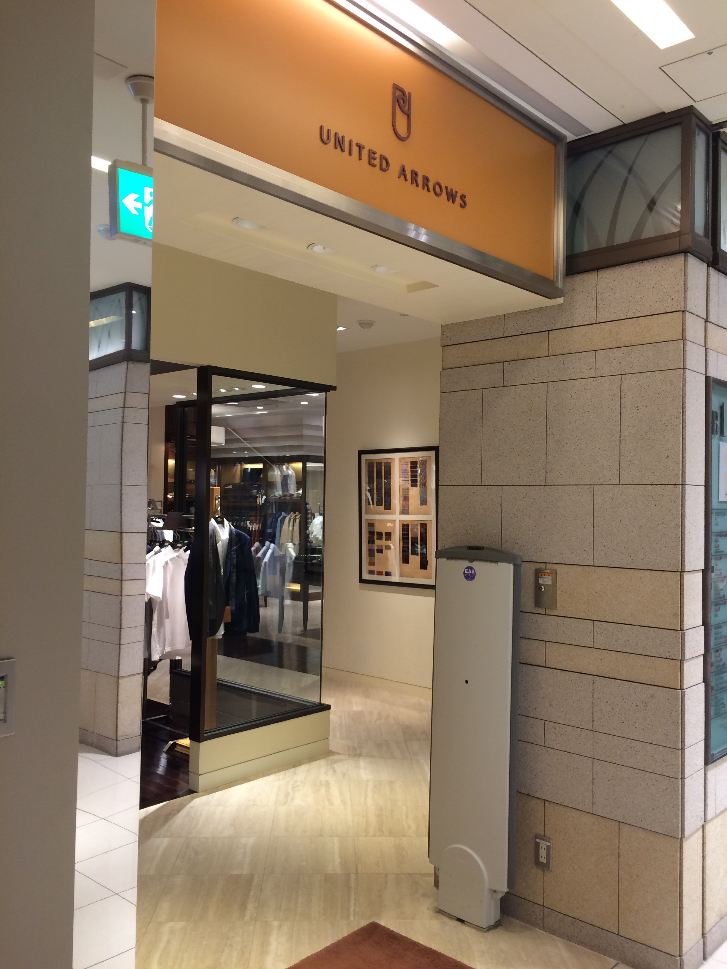 福岡店(インショップ)